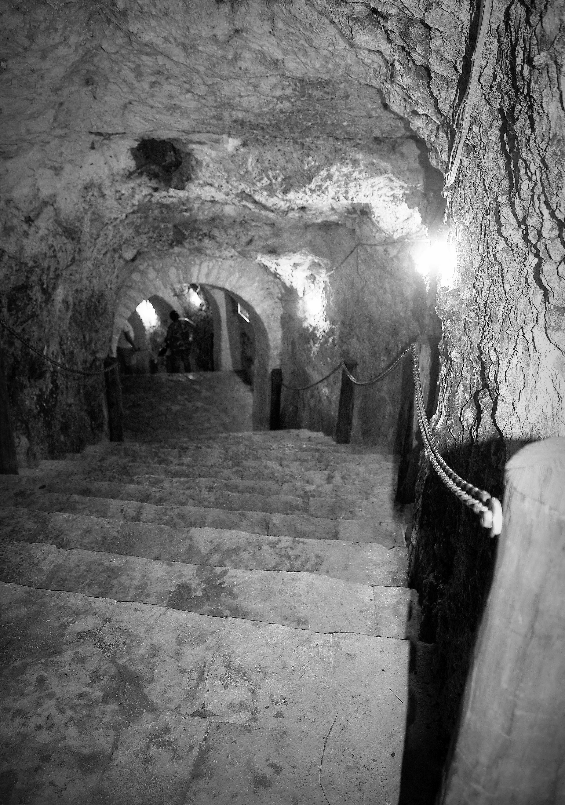 IMG_4313lll